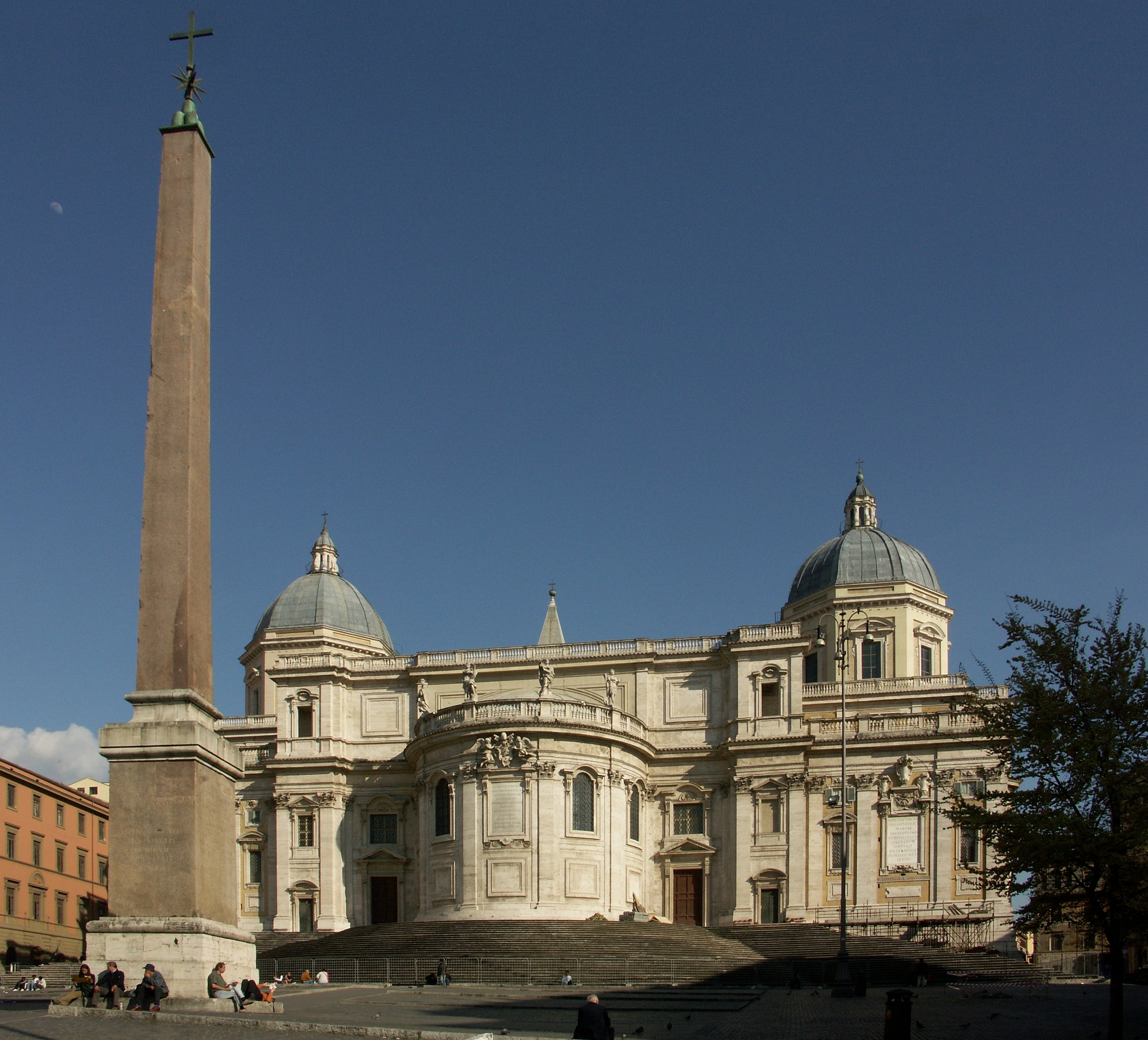 Rom, Basilika Santa Maria Maggiore, Außenansicht Rückseite